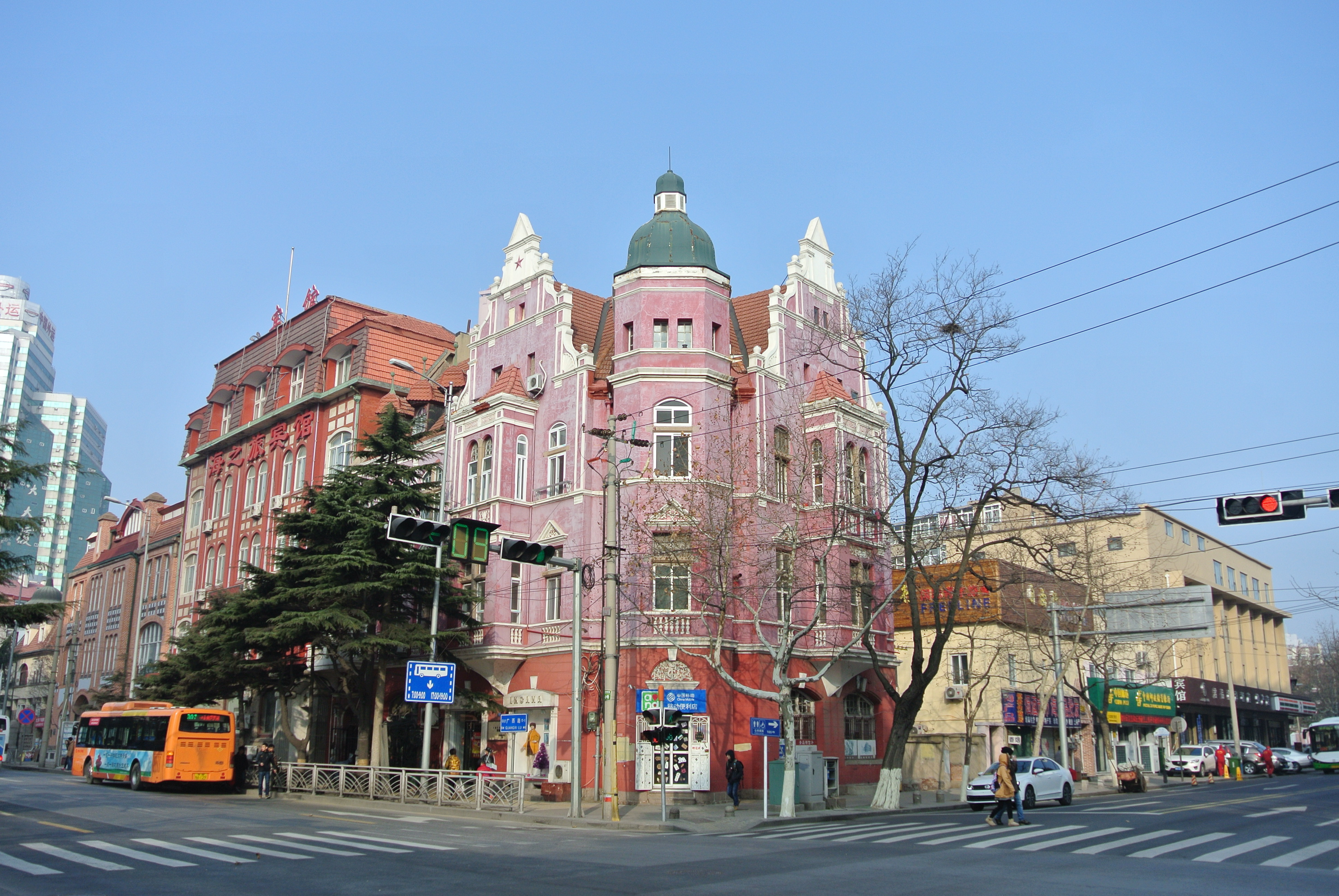 青岛广西路27号德基洋行